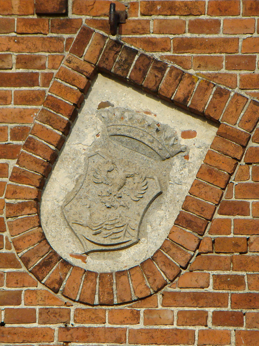 Wappen der Editha von Wartensleben (Gattin des Kuno von Hahn) am Gutshof in Christinenhof, Gielow, Lkr. Demmin